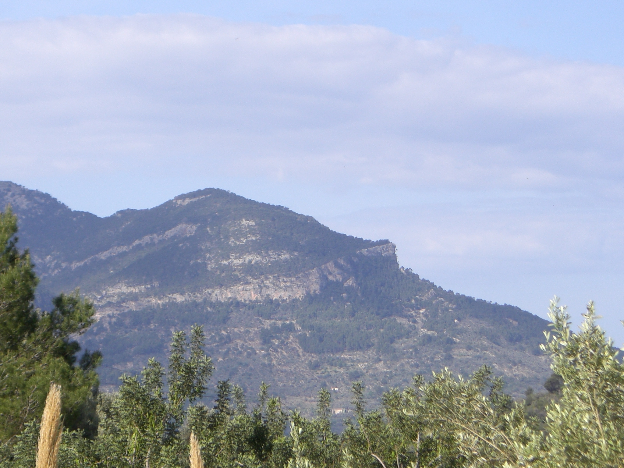 Puig des Moro (785 m), Sóller, Mallorca (feta des de Fornalutx)